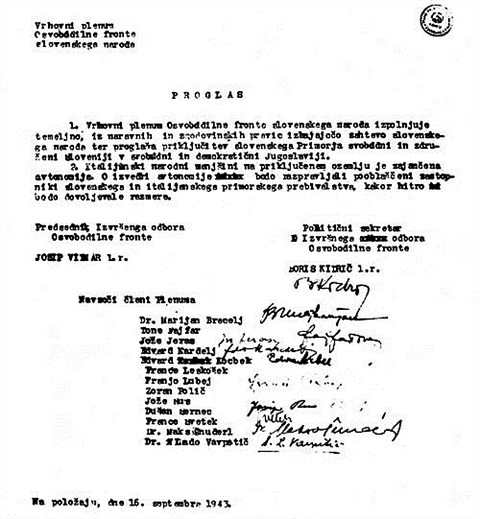 Proglas o priključitvi Primorske matični domovini, 16. september 1943